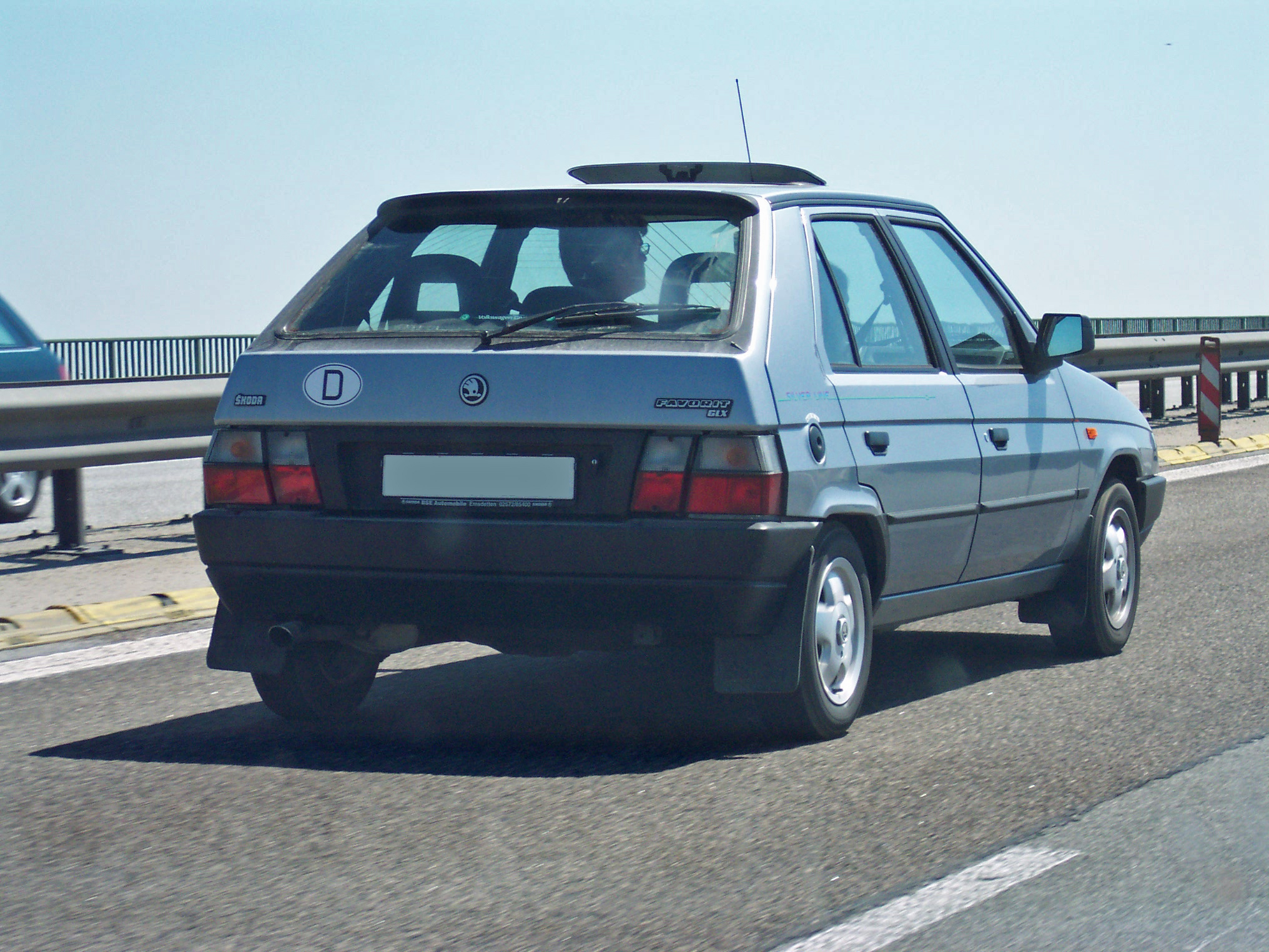 Škoda Favorit GLX (pic taken in Denmark)